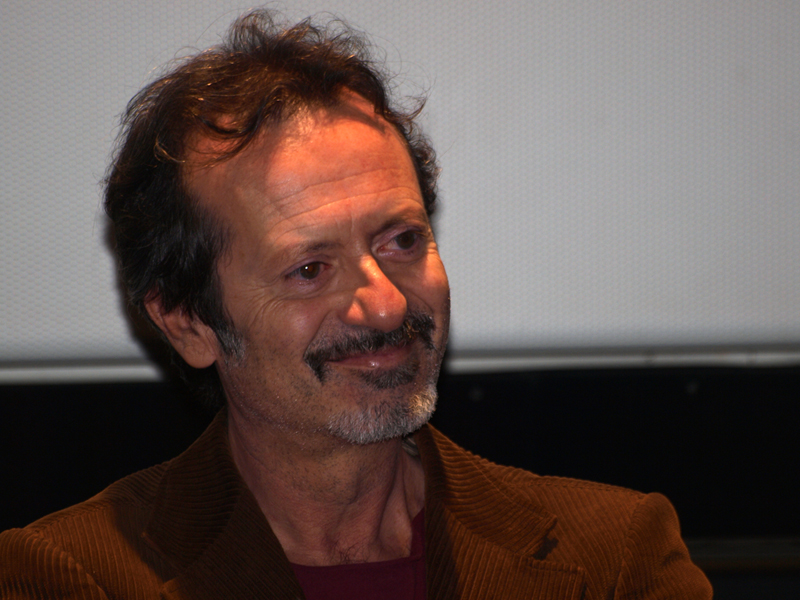 Rocco Papaleo: regista, attore e musicista lucano